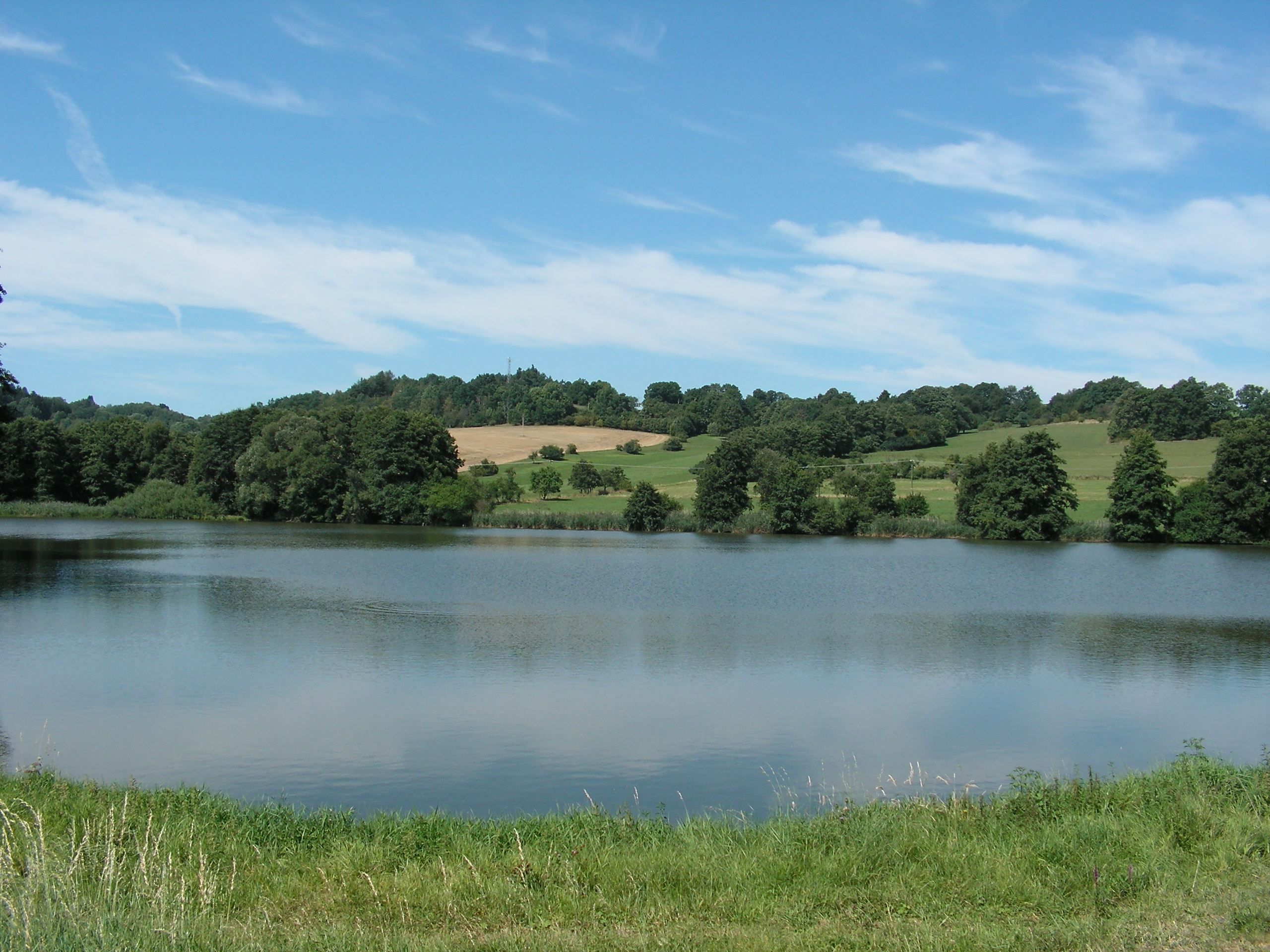 Rybník Vinduška na říčce Chotýšance mezi Voticemi a Jankovem v okrese Benešov